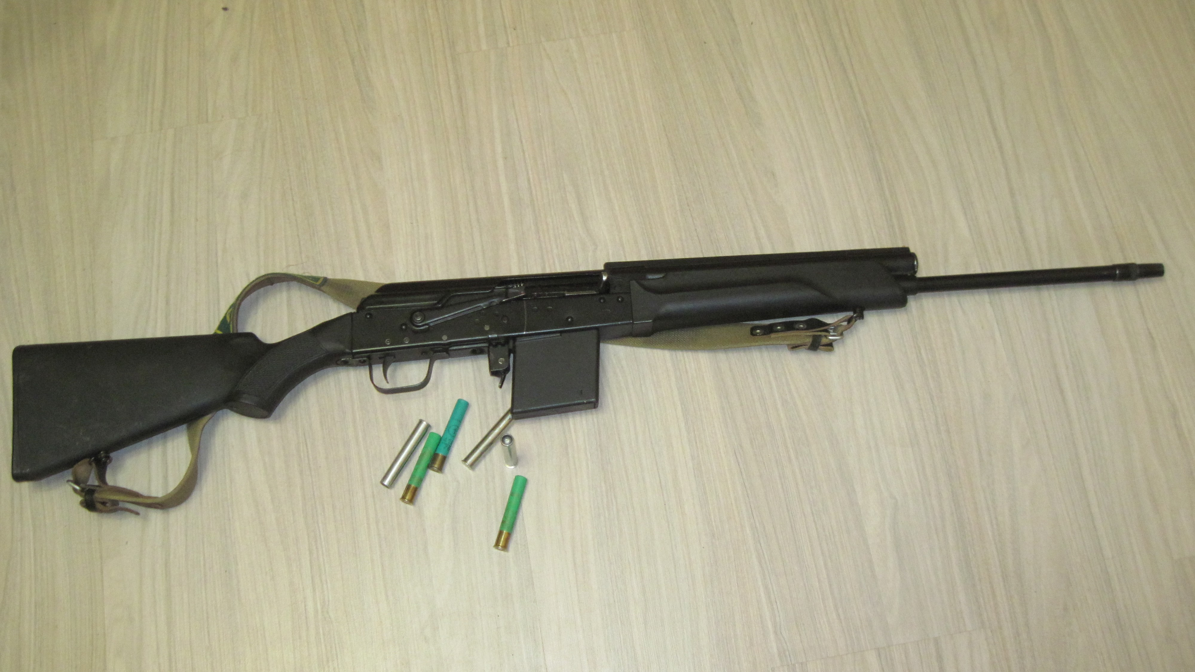 Заводской вариант с прикладом.